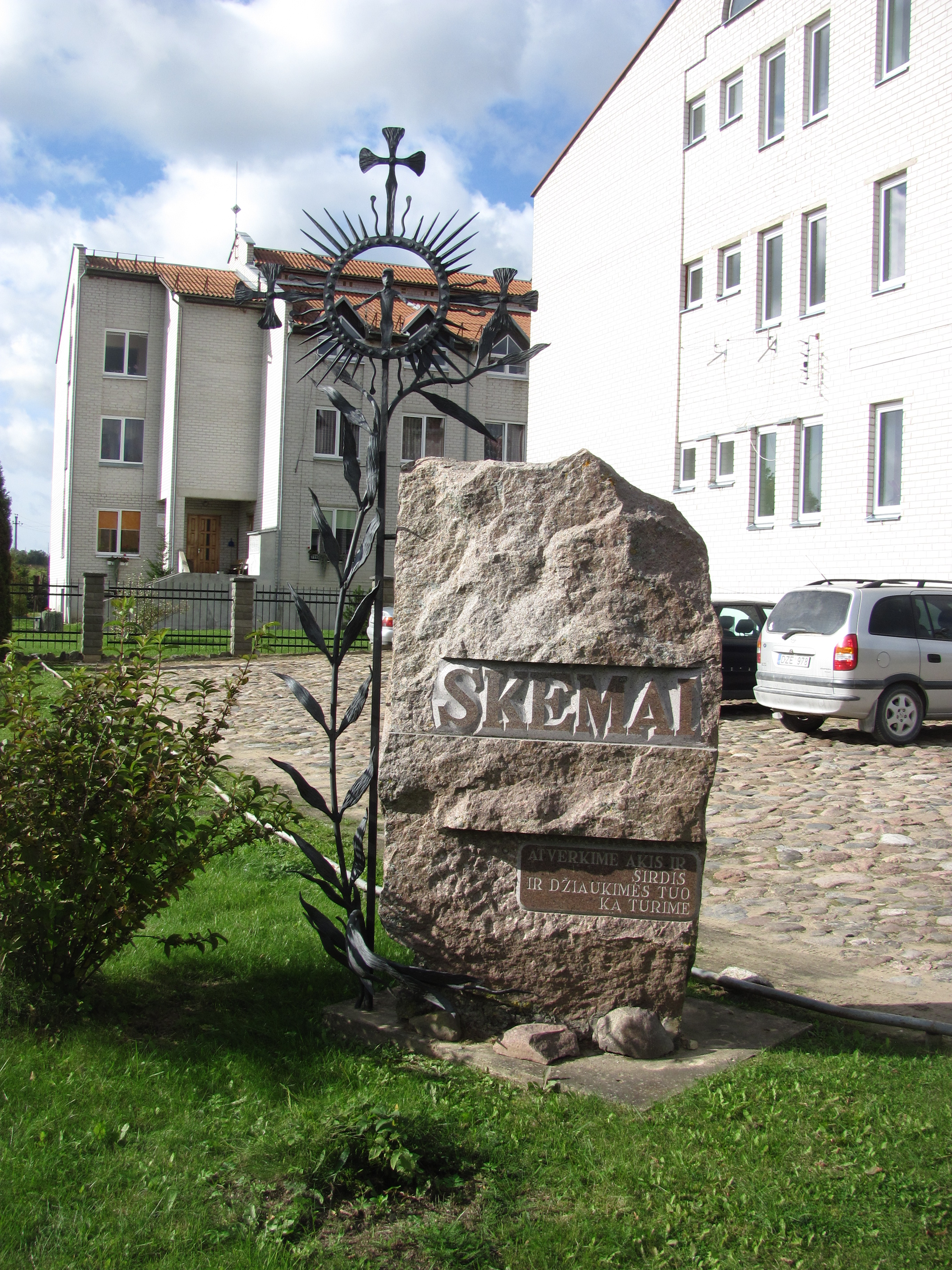 Obelių sen., Lithuania